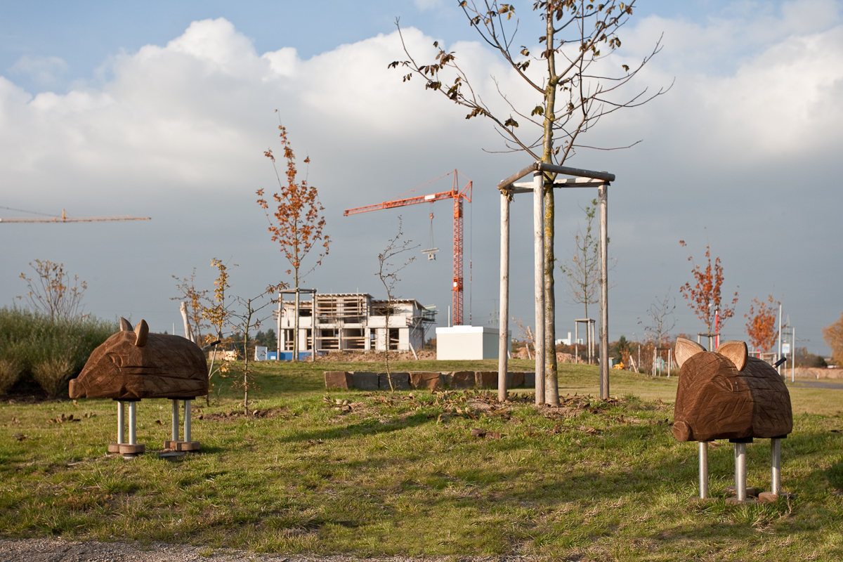 Blick auf das Neubaugebiet An den Eichen in Offenbach am Main